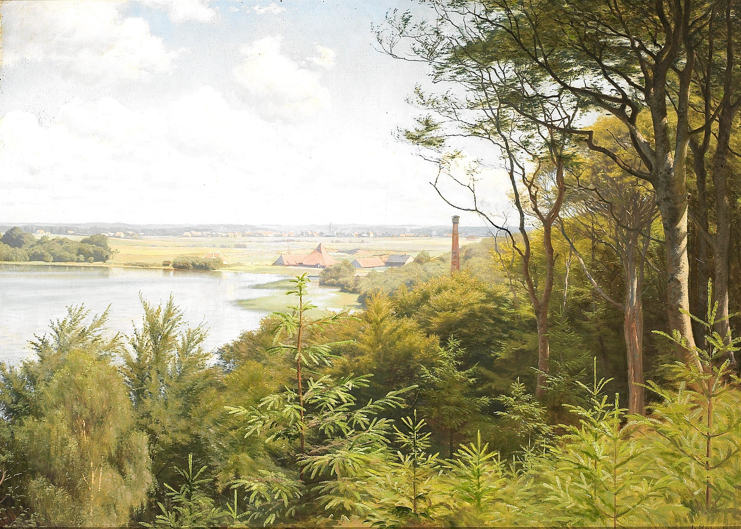 Kuranstalten Ørnesø, i baggrunden Silkeborg